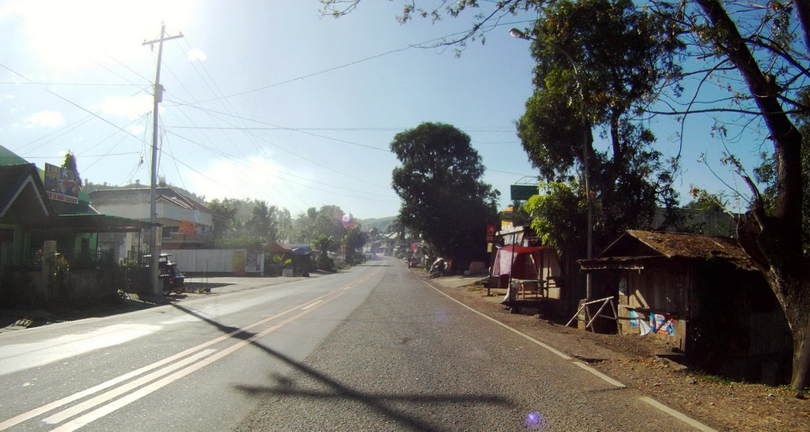 Diadi, Philippines